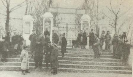 ворота в старый парк